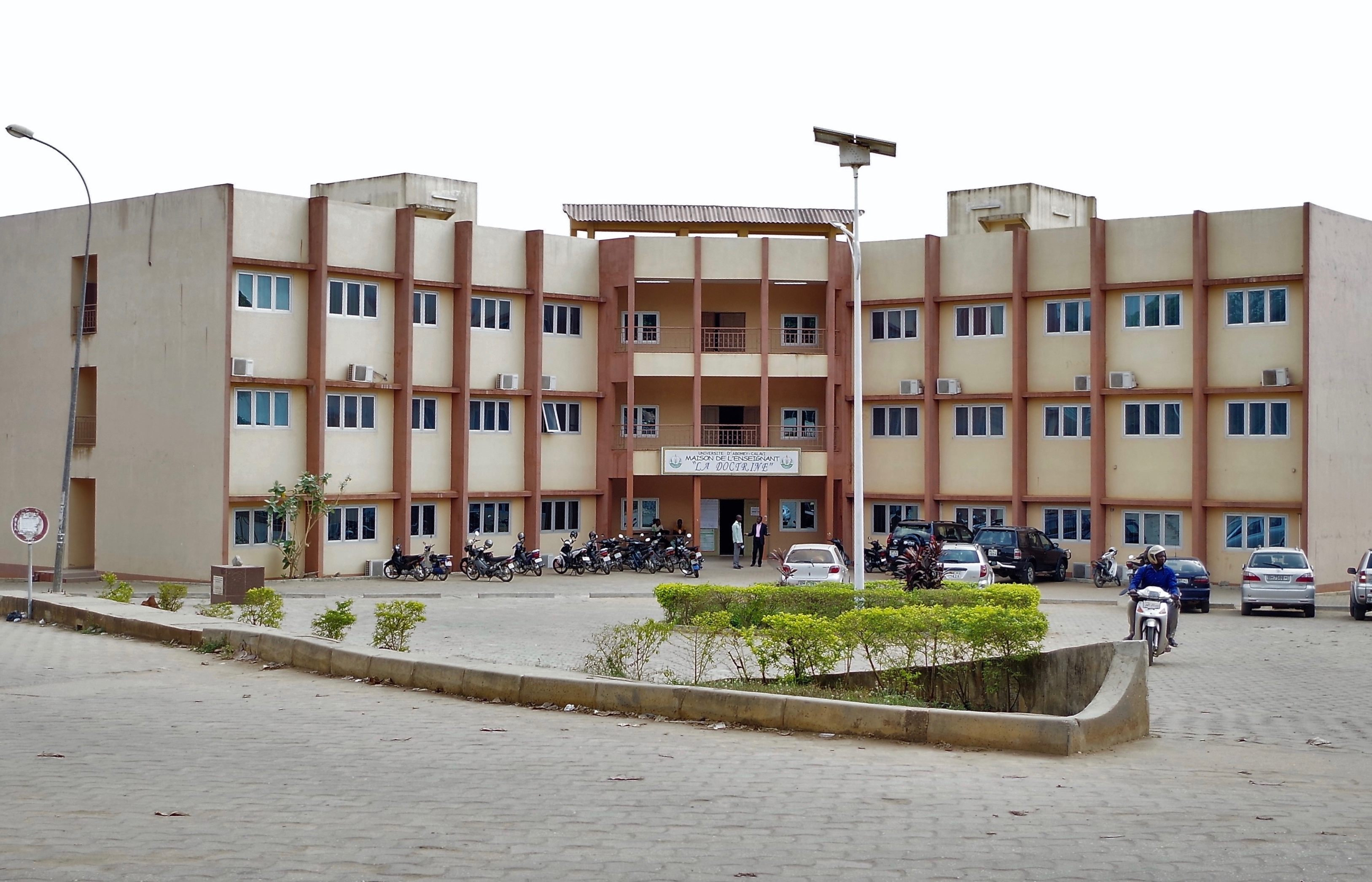 Maison de l'enseignant à de l'Université d'Abomey-Calavi-Bénin. un bâtiment de 2 étage comportant des bureaux pour les enseignants Bénin dont la pose de la première pierre est faite en 2017 par le recteur d'alors le professeur Brise Sinsin